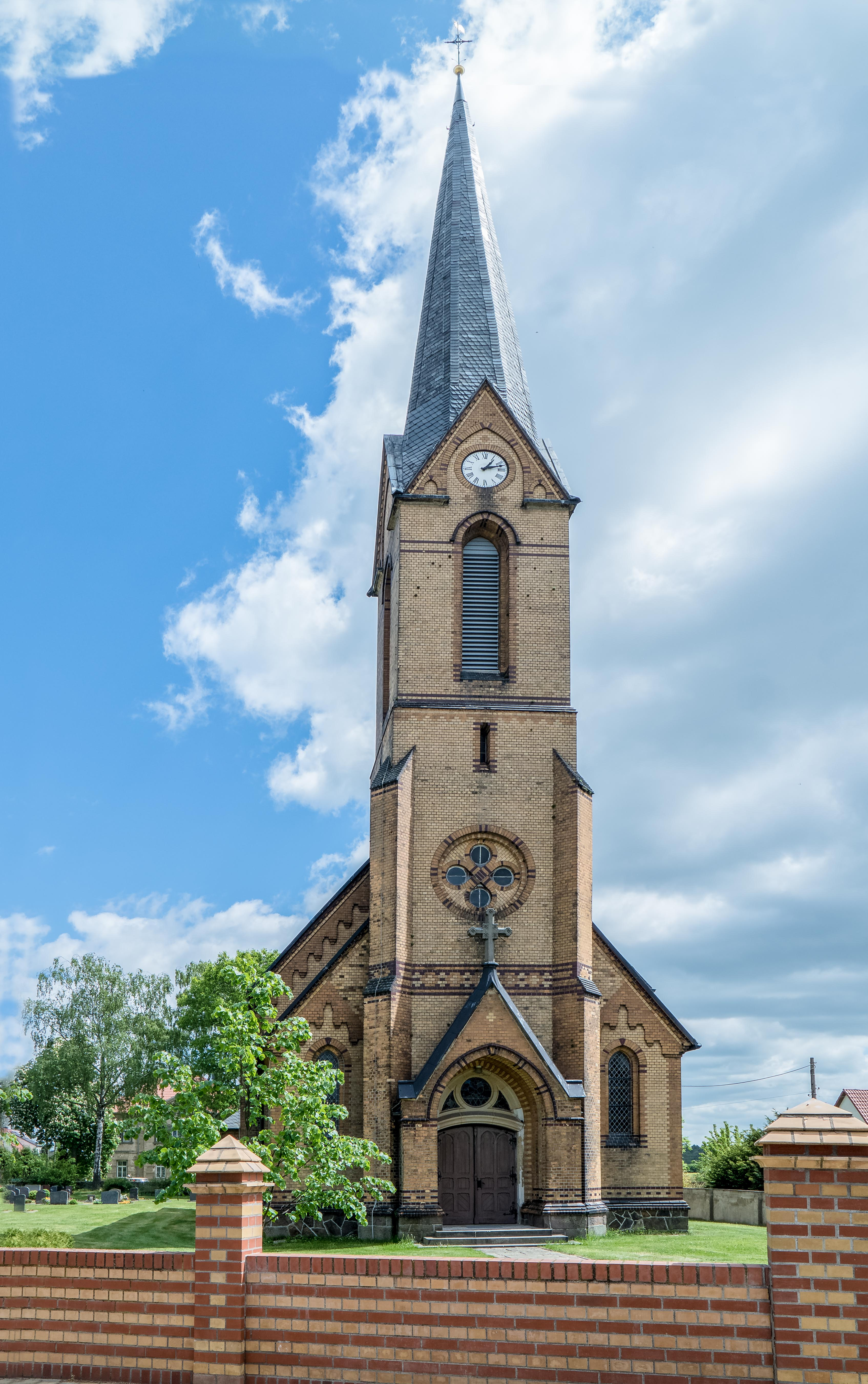 Kirche St. Katharina Kreinitz